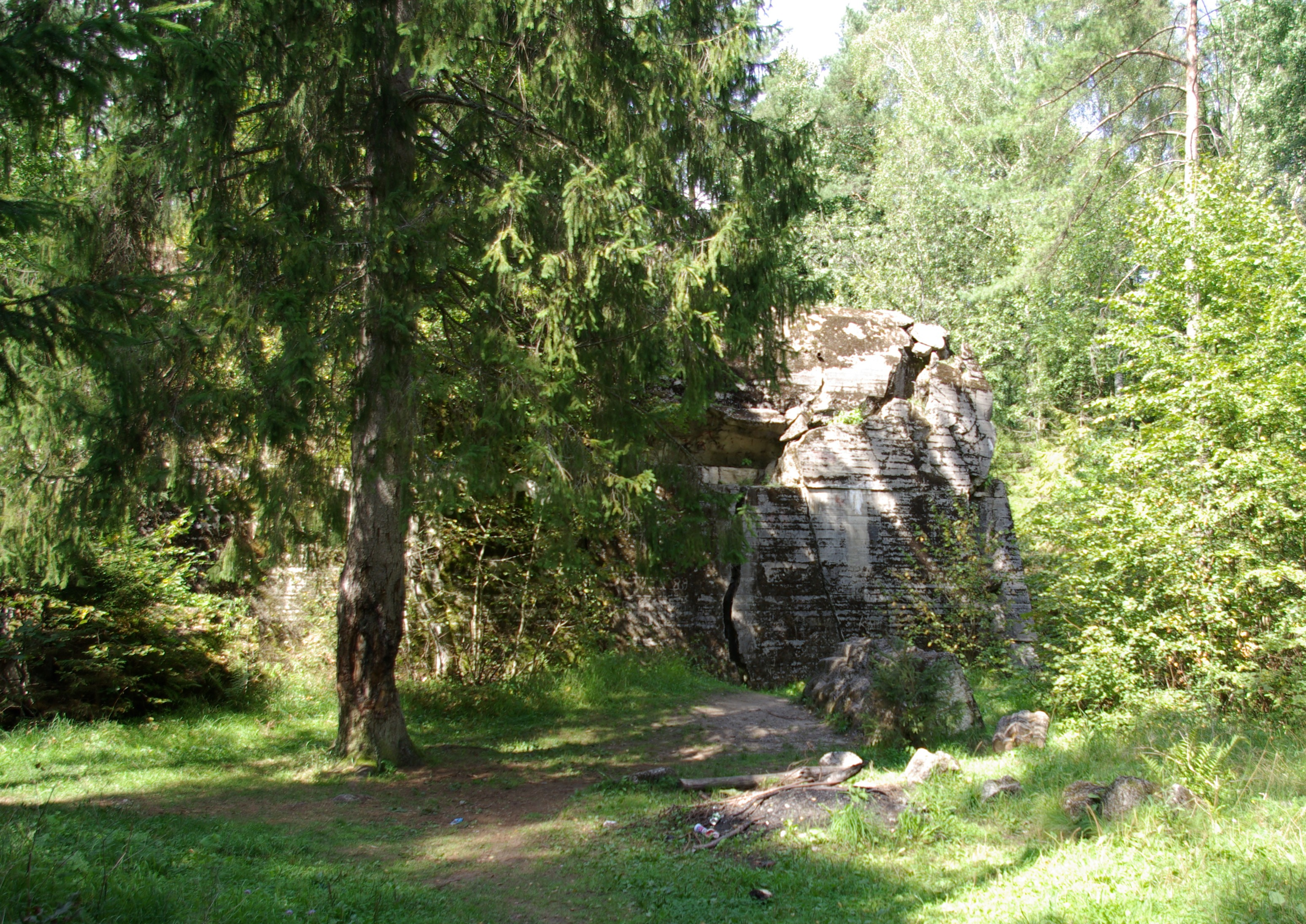 Kwatera Himmlera Hochwald